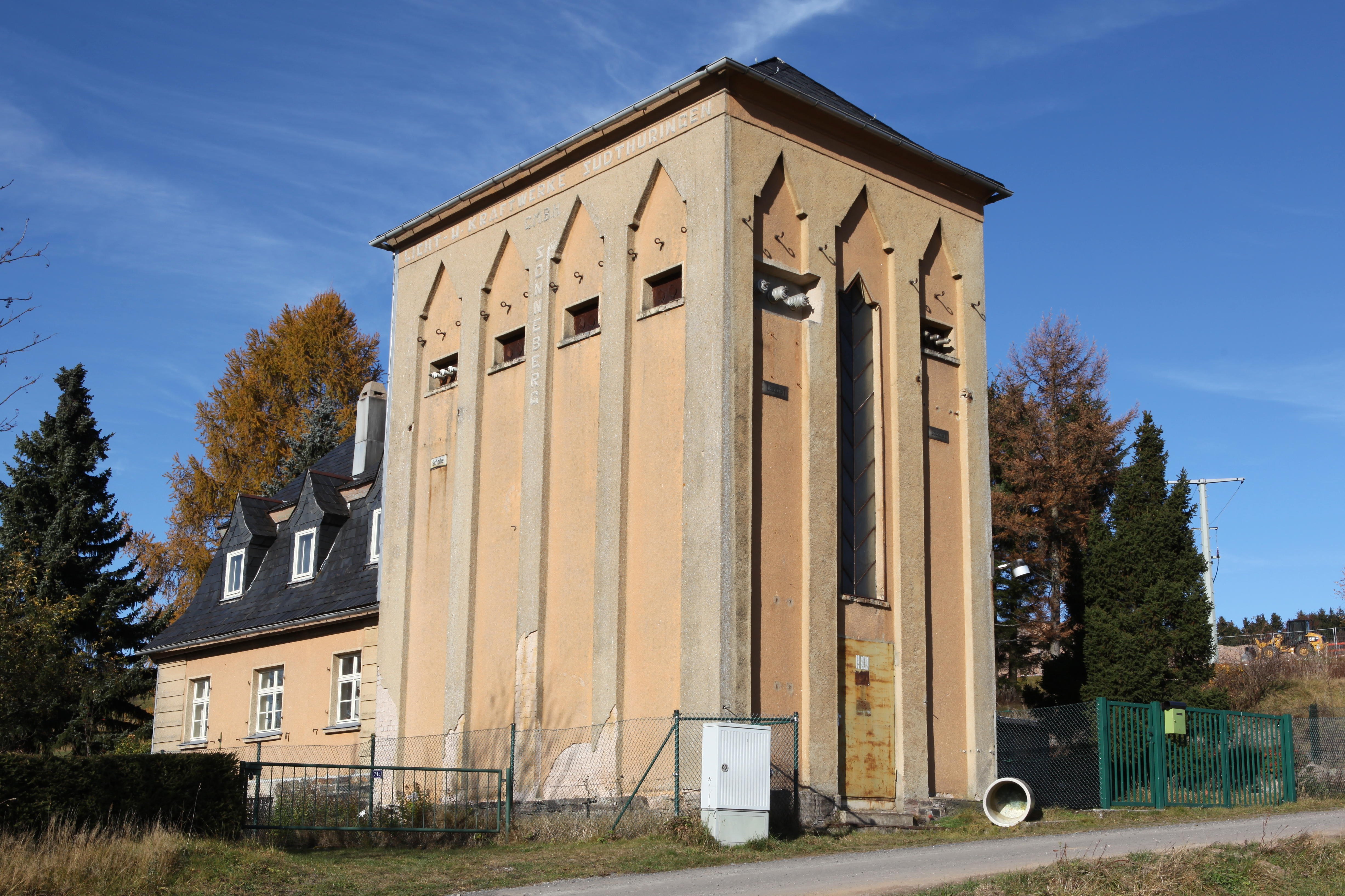 Umspannwerk, 1925/26, Lauscha, Straße der Jugend 75